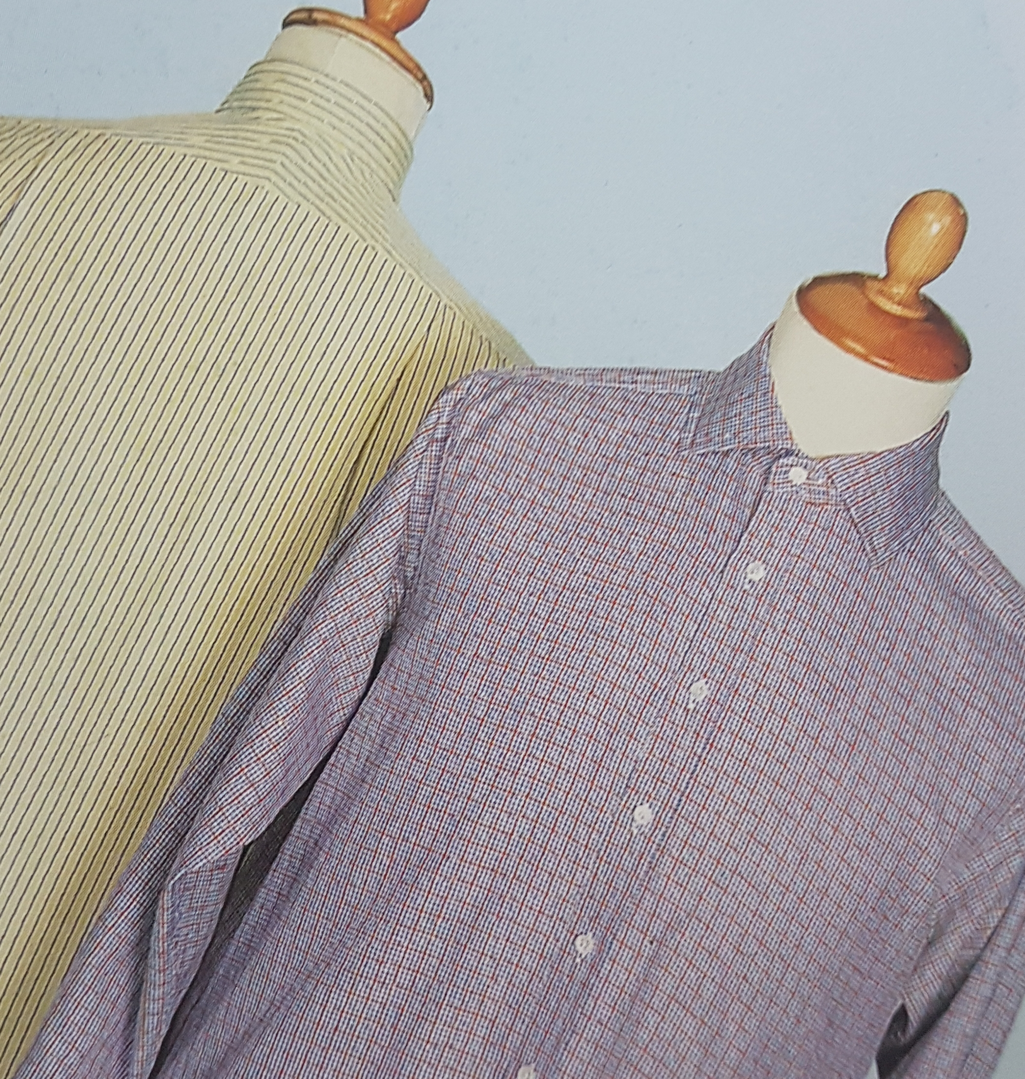 πουκάμισα